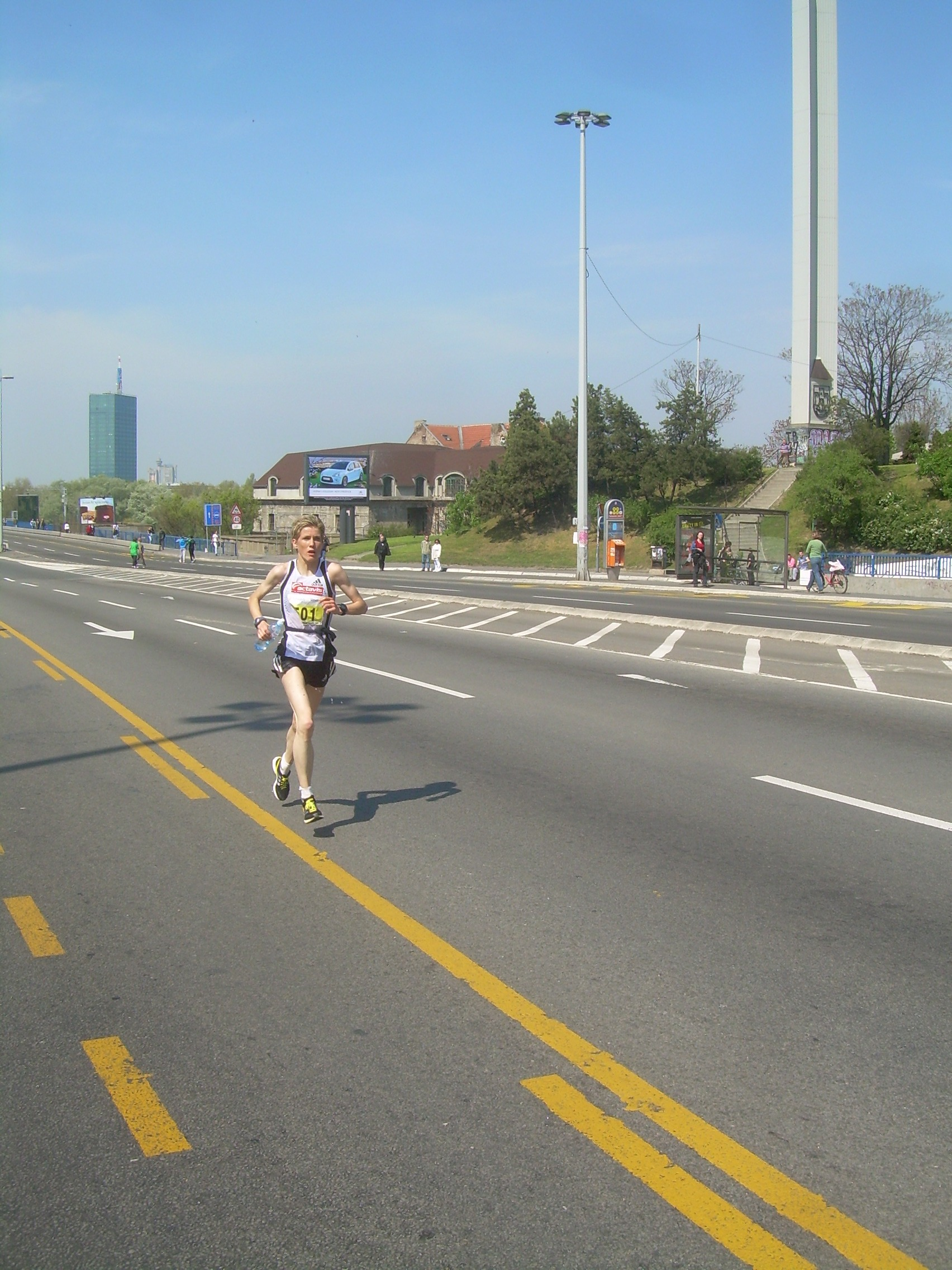 23. Београдски маратон, Оливера Јевтић победница полумаратонске трке. Слика направљена 18.априла 2010.